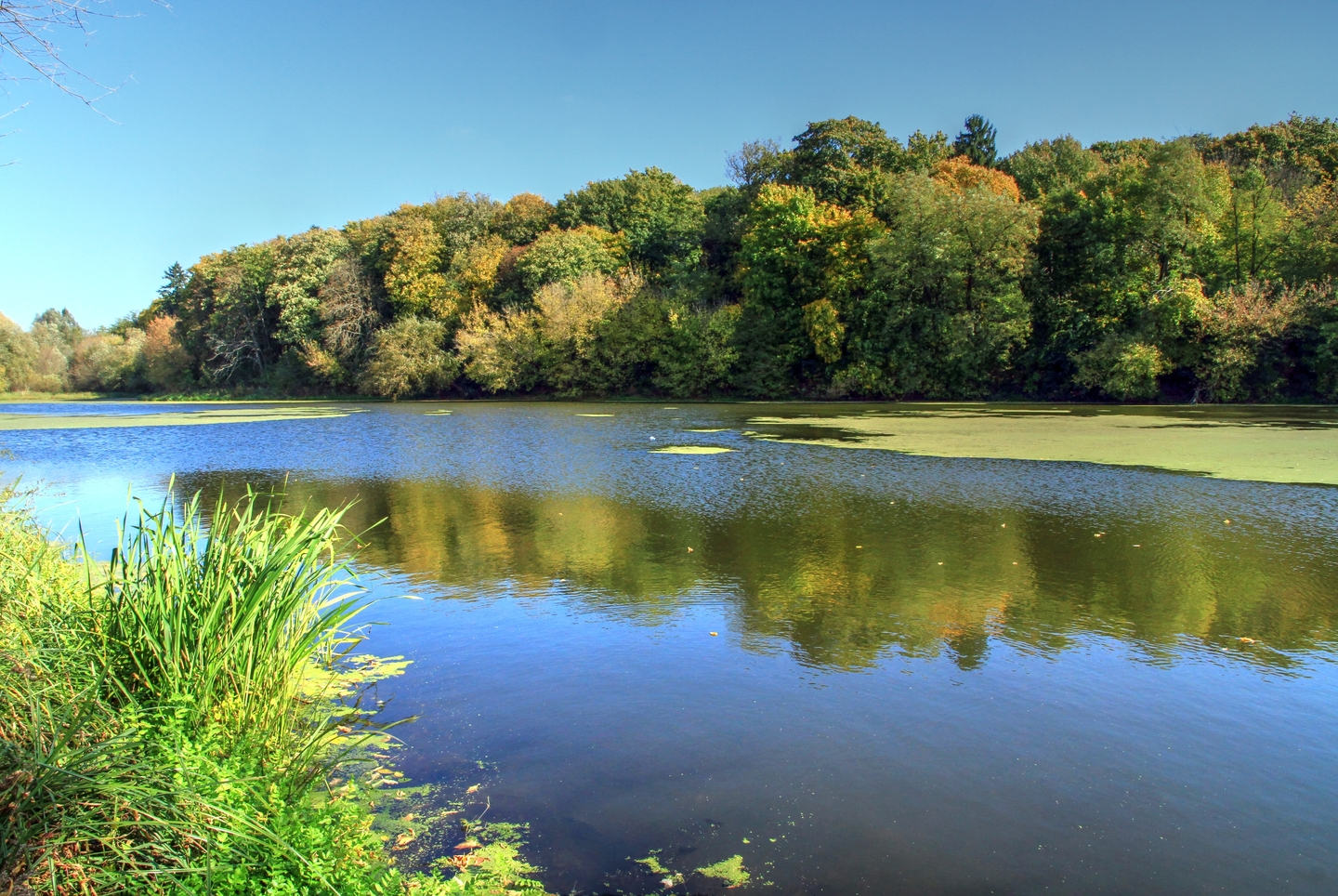 Павловский парк, монумент природы, находится в Бриченский район, с. Павловка (код MD-BR-map-002)